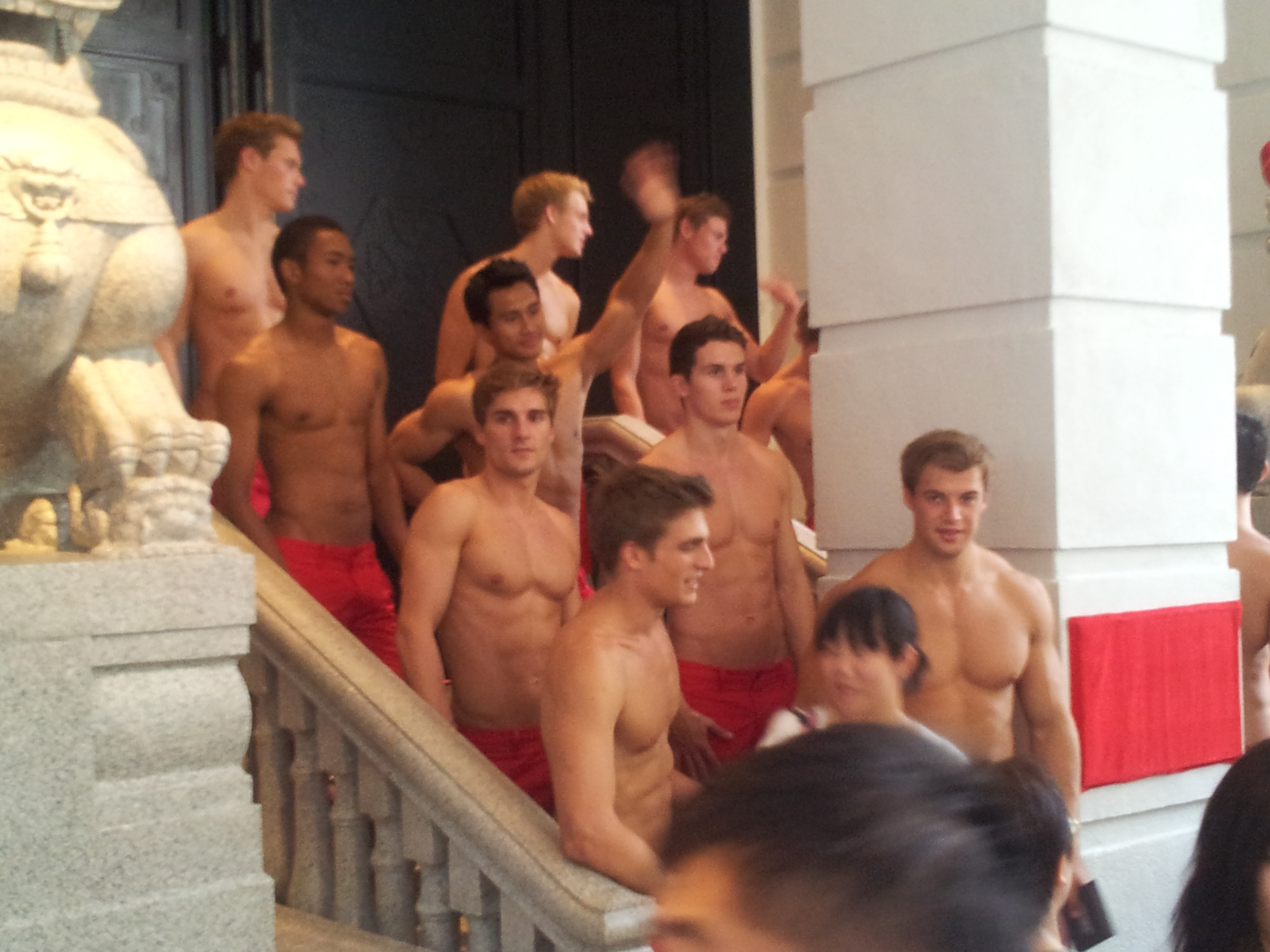 Abercrombie & Fitch Model